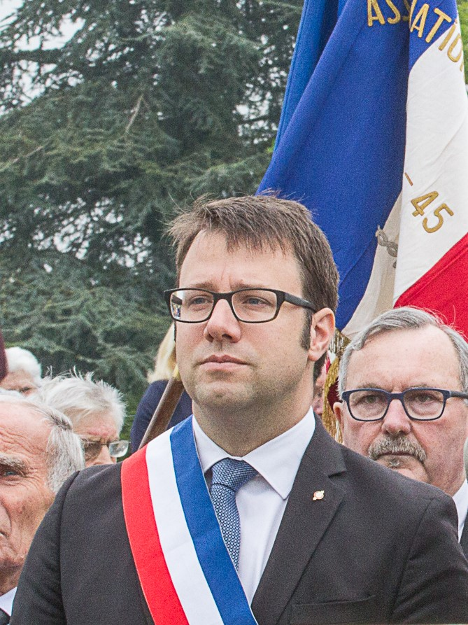 Cérémonie du 8 mai 2017 à Liffré, présidée par Loïg Chesnais-Girard, maire de Liffré